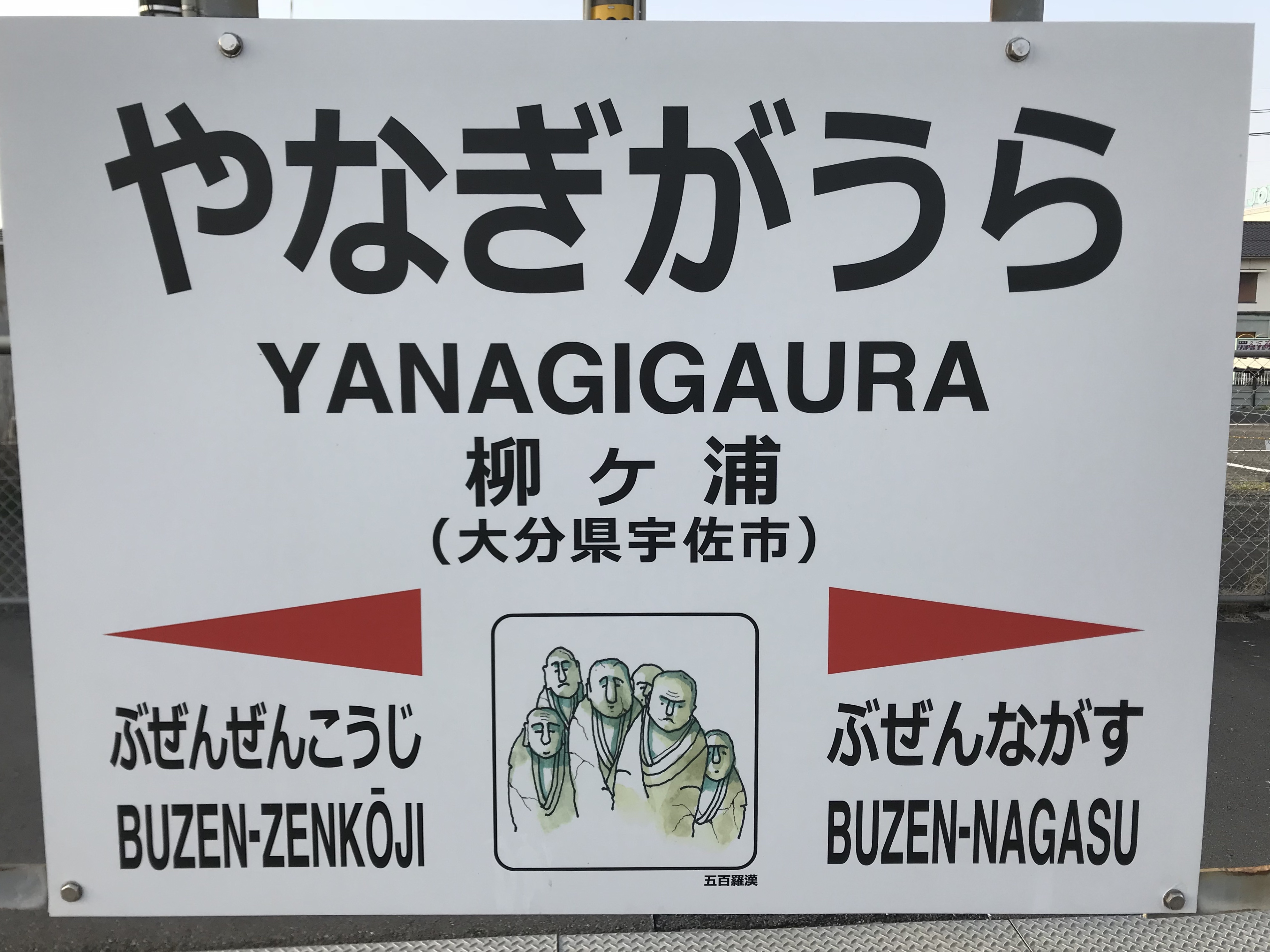 柳ヶ浦駅の駅名標。イラストは東光寺の五百羅漢